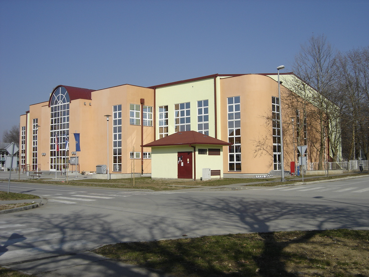 Nastavno-sportska dvorana u Belom Manastiru, Beli Manastir